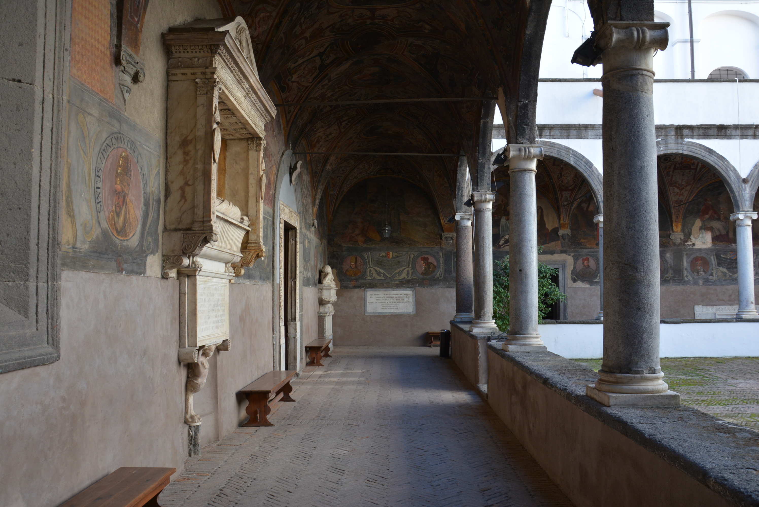 Chiostro piccolo della chiesa di Santa Maria la Nova a Napoli